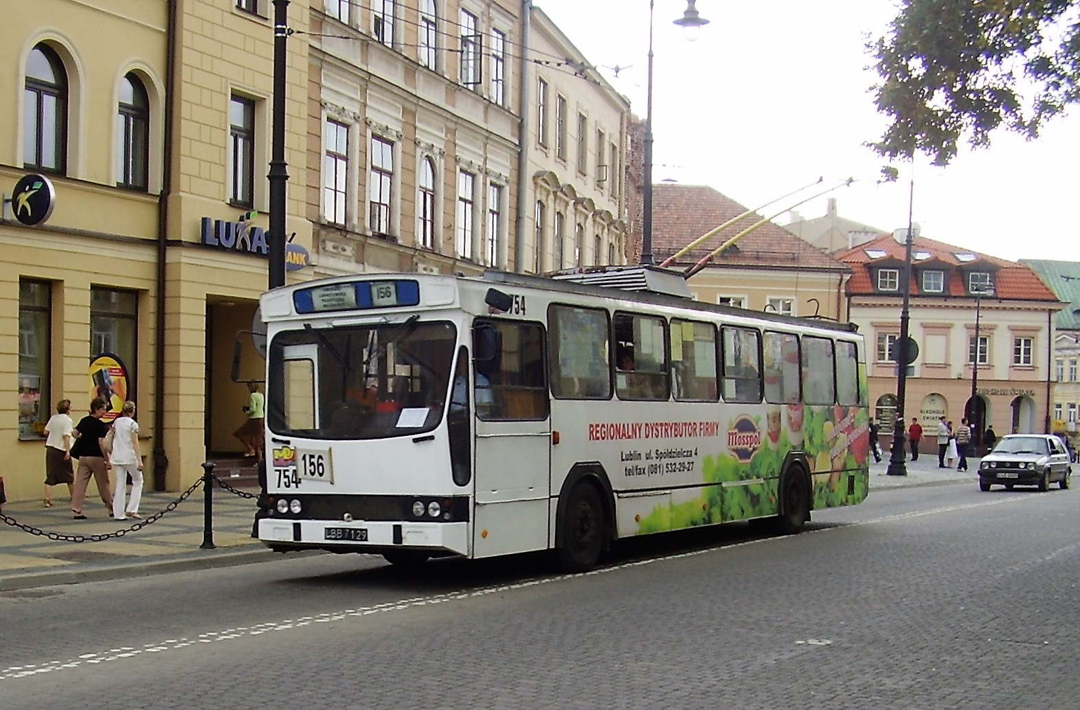 Lublin. Trolleybus Jelcz PR110E. Wykonany przez firmę KPNA ze Słupska w 1988 roku.